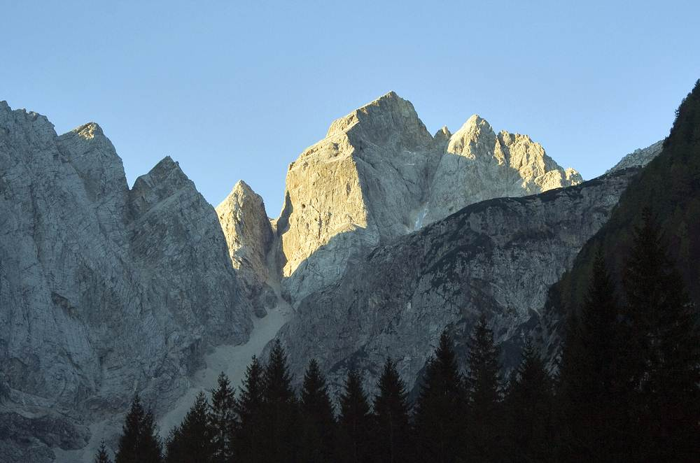 Jalovec - 2645 m.n.m. z doliny Tamar